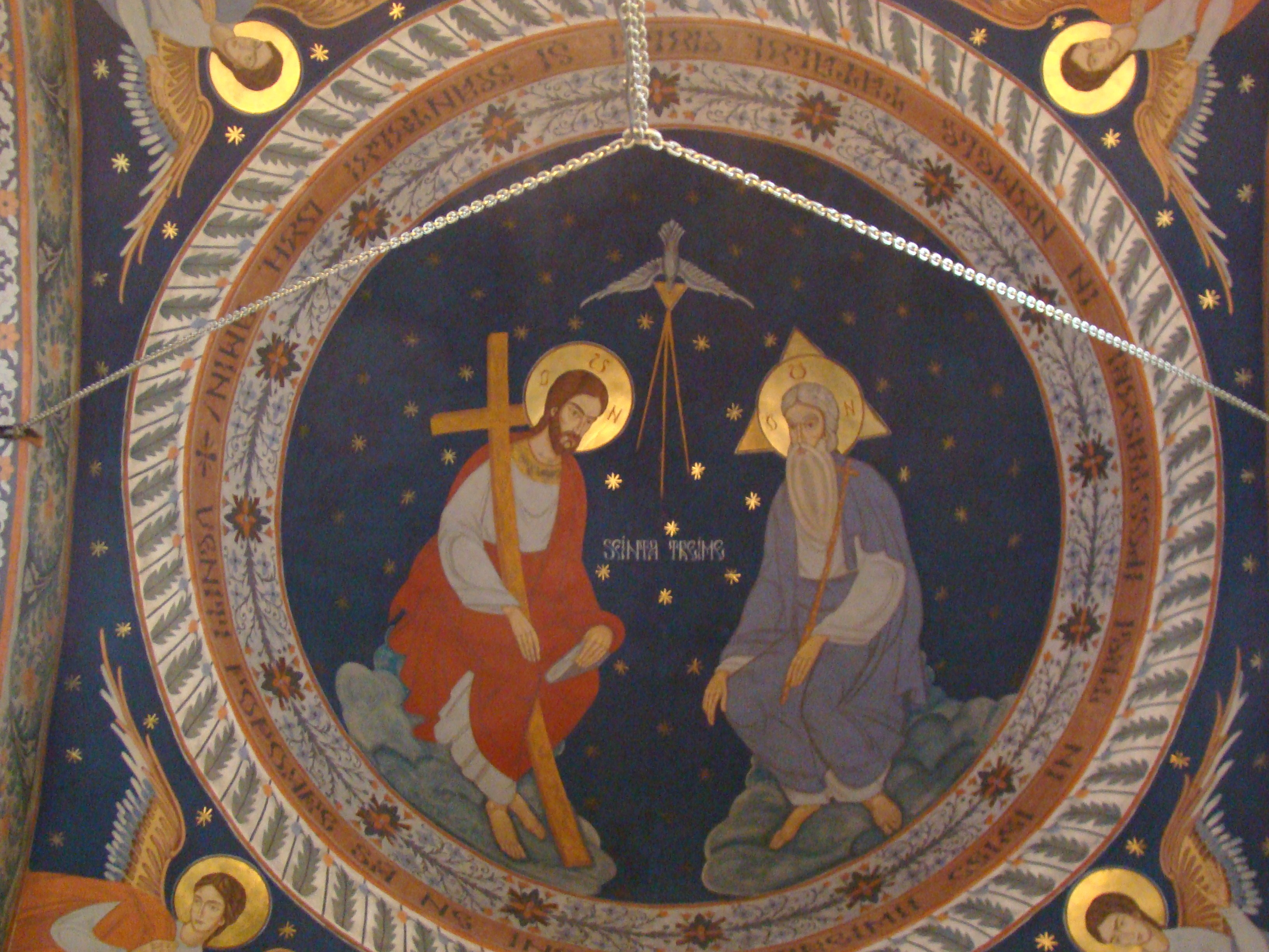 Biserica "Sf. Gheorghe", municipiul Curtea de Argeș, Bd. Basarabilor 91